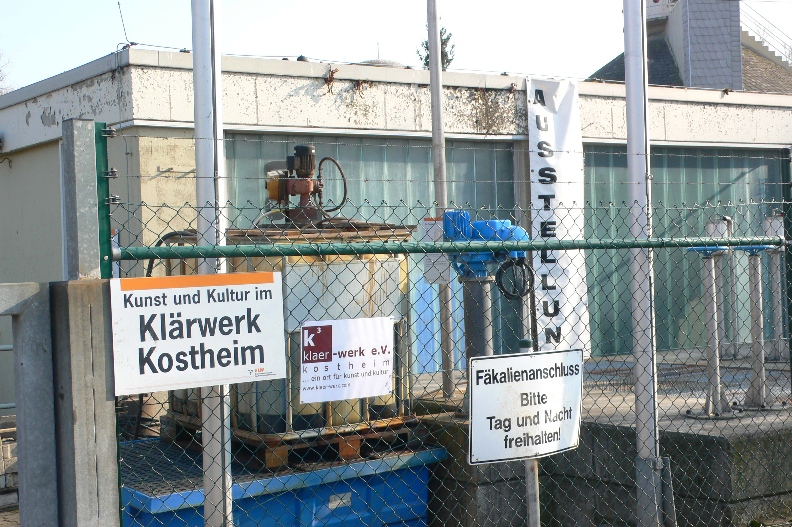 Kultur in Kostheim